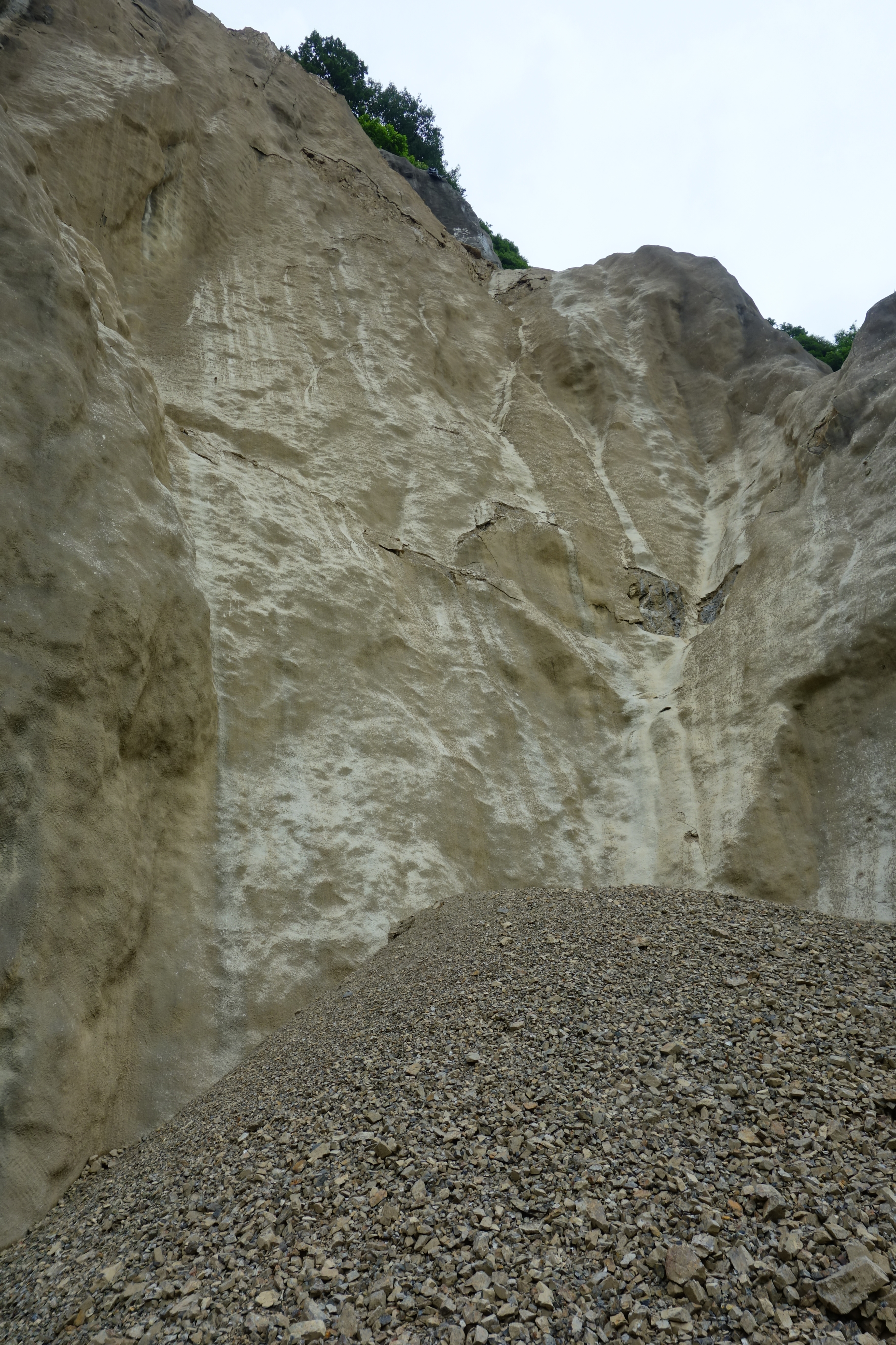 広島県府中市の出口川湧水処理施設の上流にある鉱毒が溶出している採石場。上方より崩落した岩石が、放置されている（下側）。上側山頂付近には、かつて応急的に敷かれたブルーシートの切れ端が垂れ下がっている。